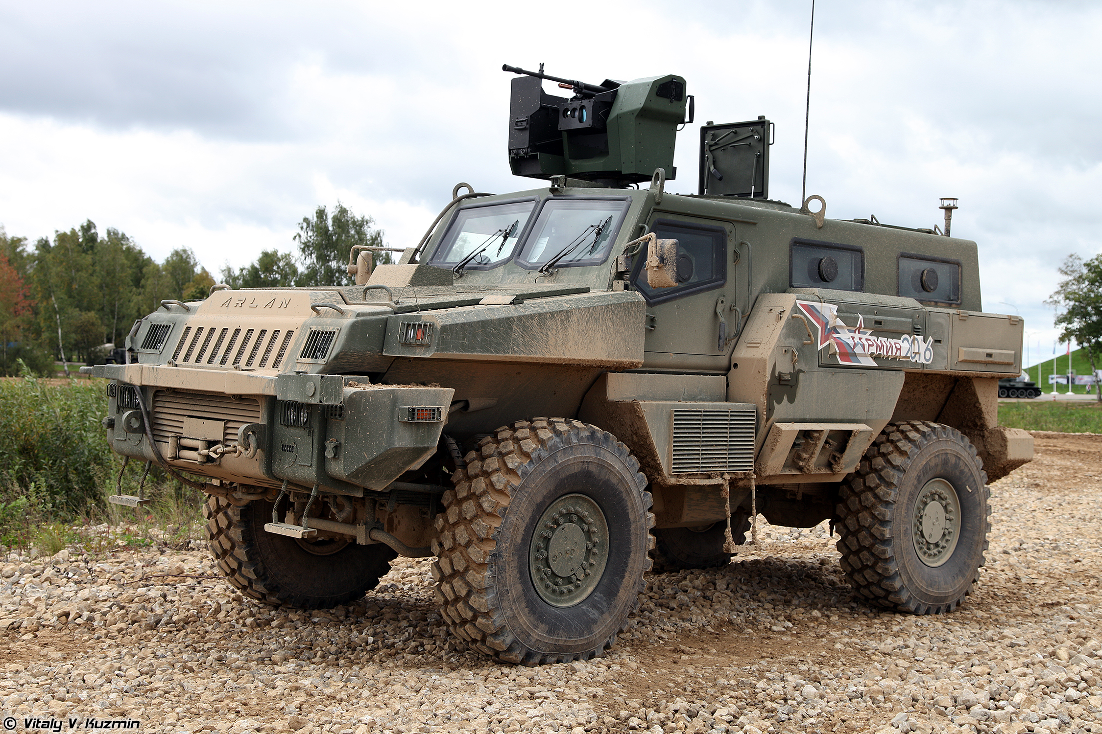 Бронеавтомобиль Арлан (Arlan armored vehicle)